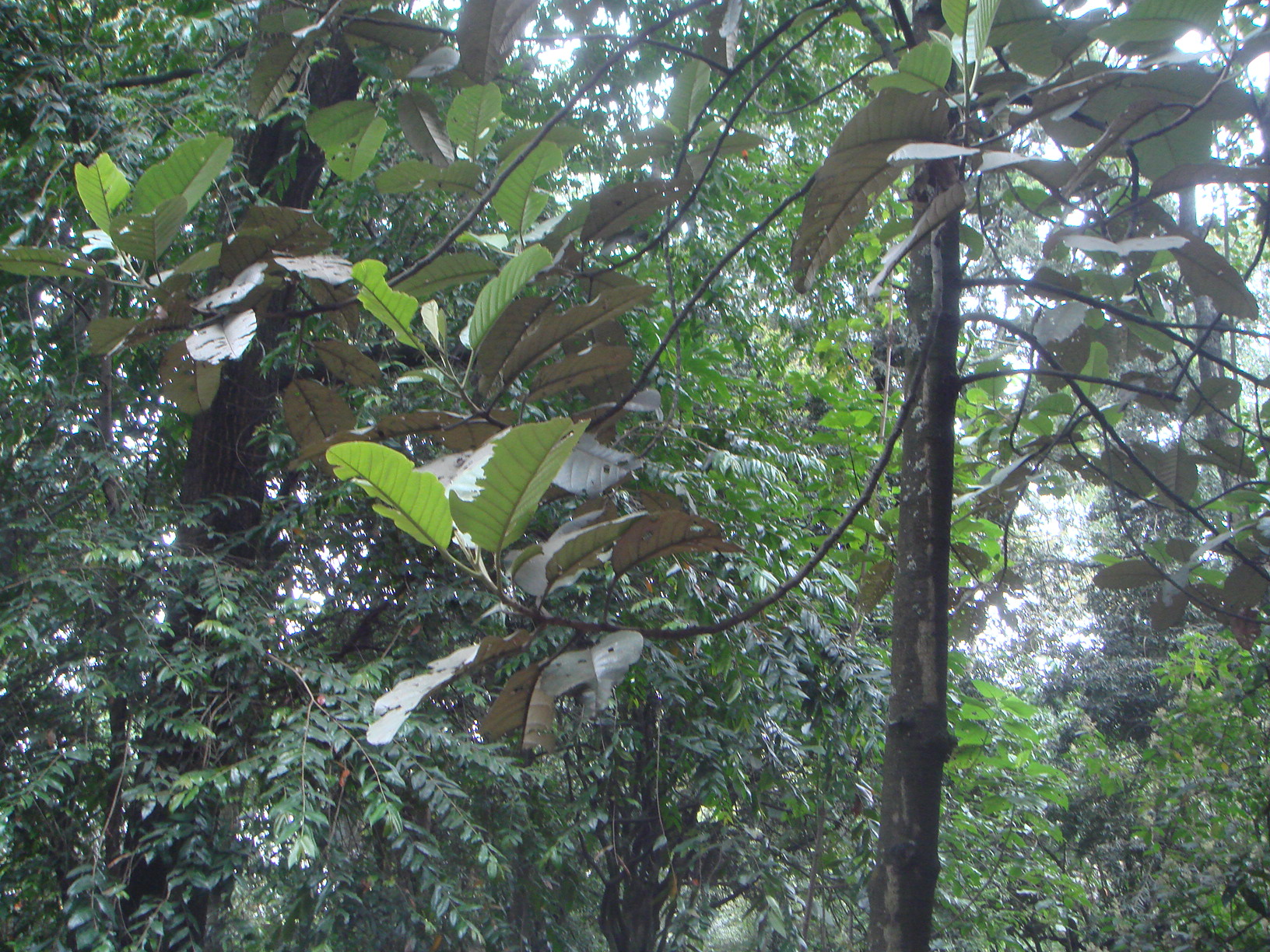 Motilón (Hieronyma macrocarpa), Jardín Botánico de Bogotá, Colombia.